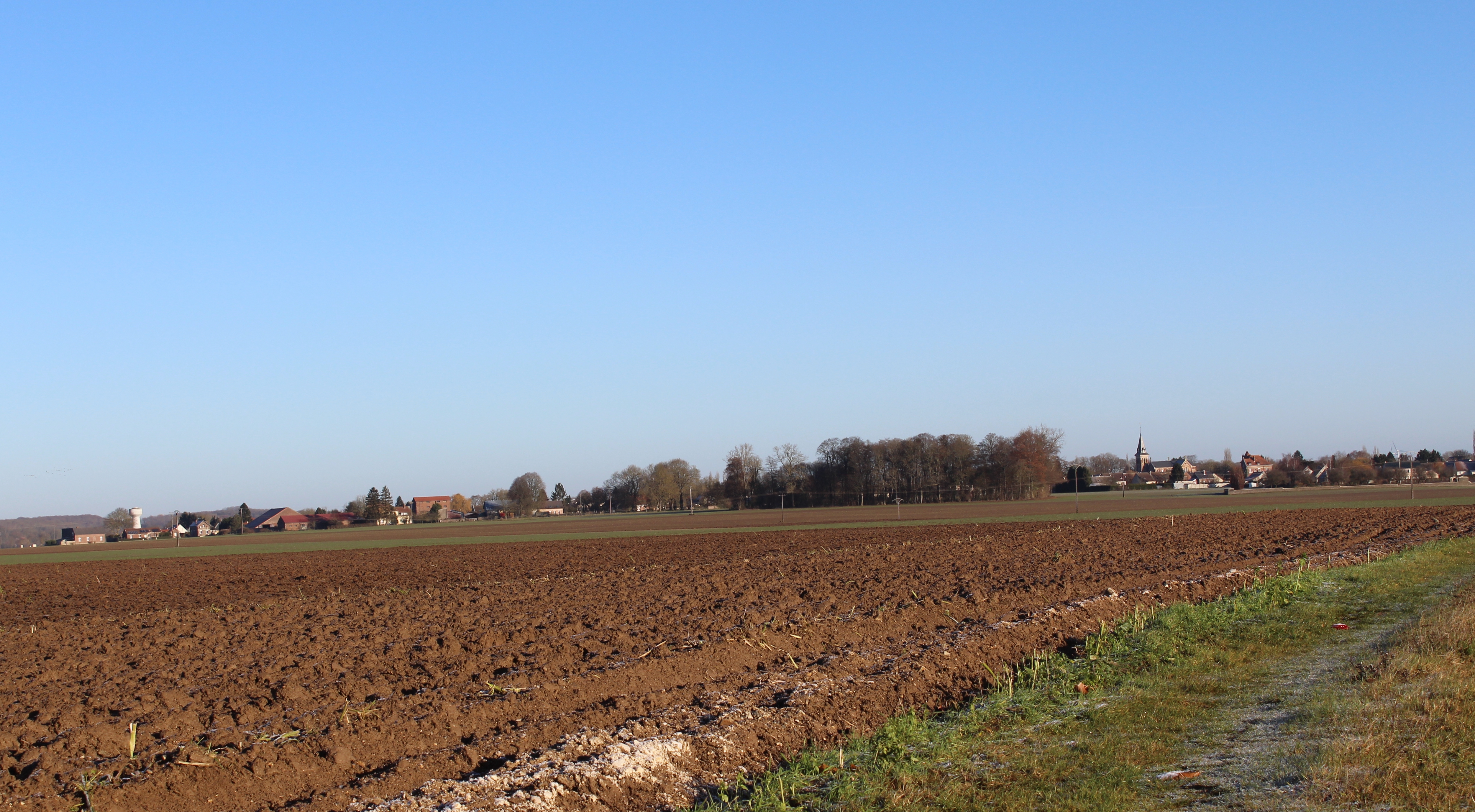 Vue générale depuis le route de Roupy.